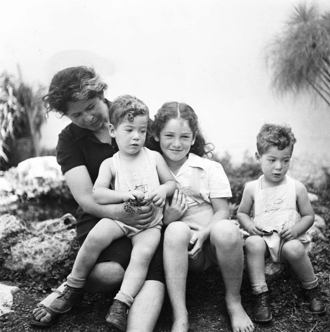 מיכל גור אריה עם ילדיה - דליה רביקוביץ והתאומים אחיק ורמי בר לוי. אוסף צילומים של הצלם זולטן קלוגר טווח מספרי התשלילים 22525 - 22613/9: קיבוץ גבע